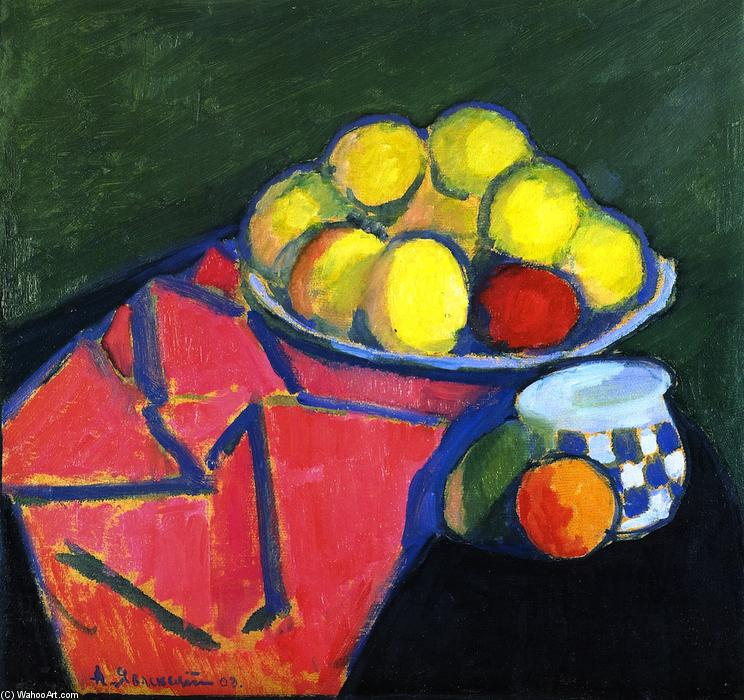 1953 wurde das Gemälde von dem ehemaligen Museumsdirektor Clemens Weiler für das Museum Wiesbaden erworben.